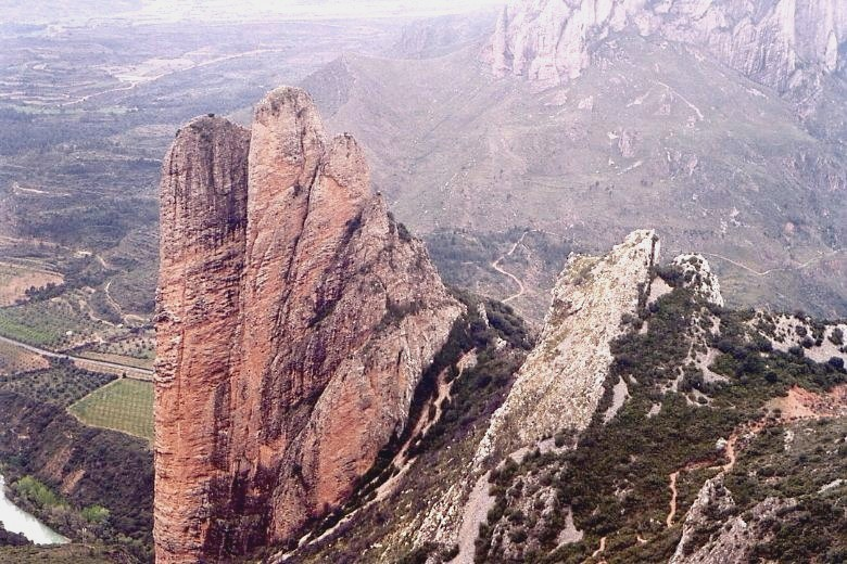 Description: Les Mallos de Riglos, vue depuis le sommet. Formation rocheuse de type conglomérat, nommée "poudingue" en géologie. Province de Huesca, Espagne. Source: Hugo Soria Licence: GFDL Hugo Soria